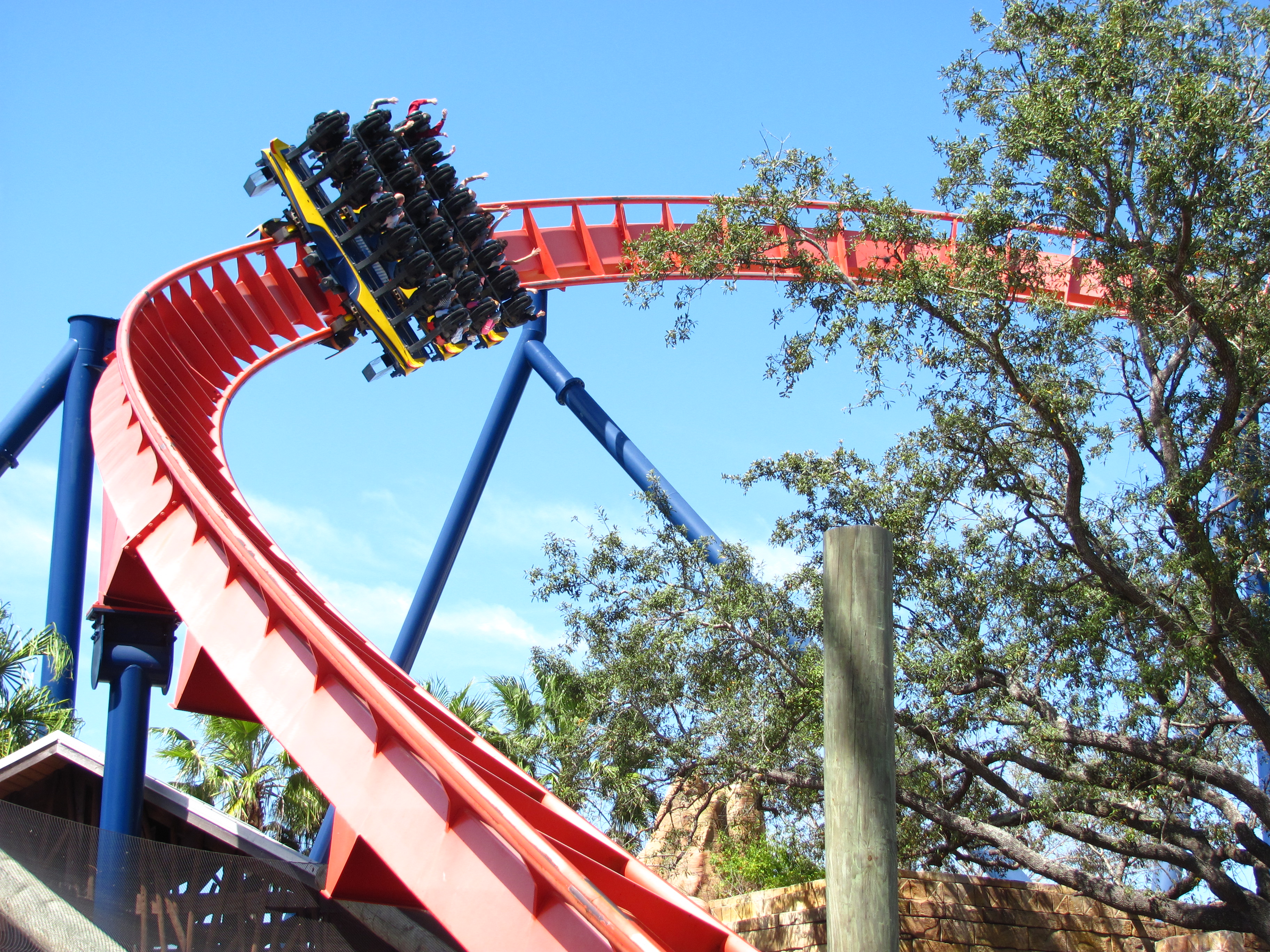 SheiKra